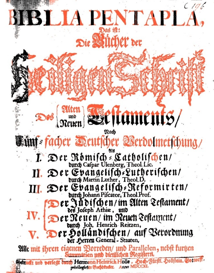 Titelblatt der Biblia pentapla von 1711